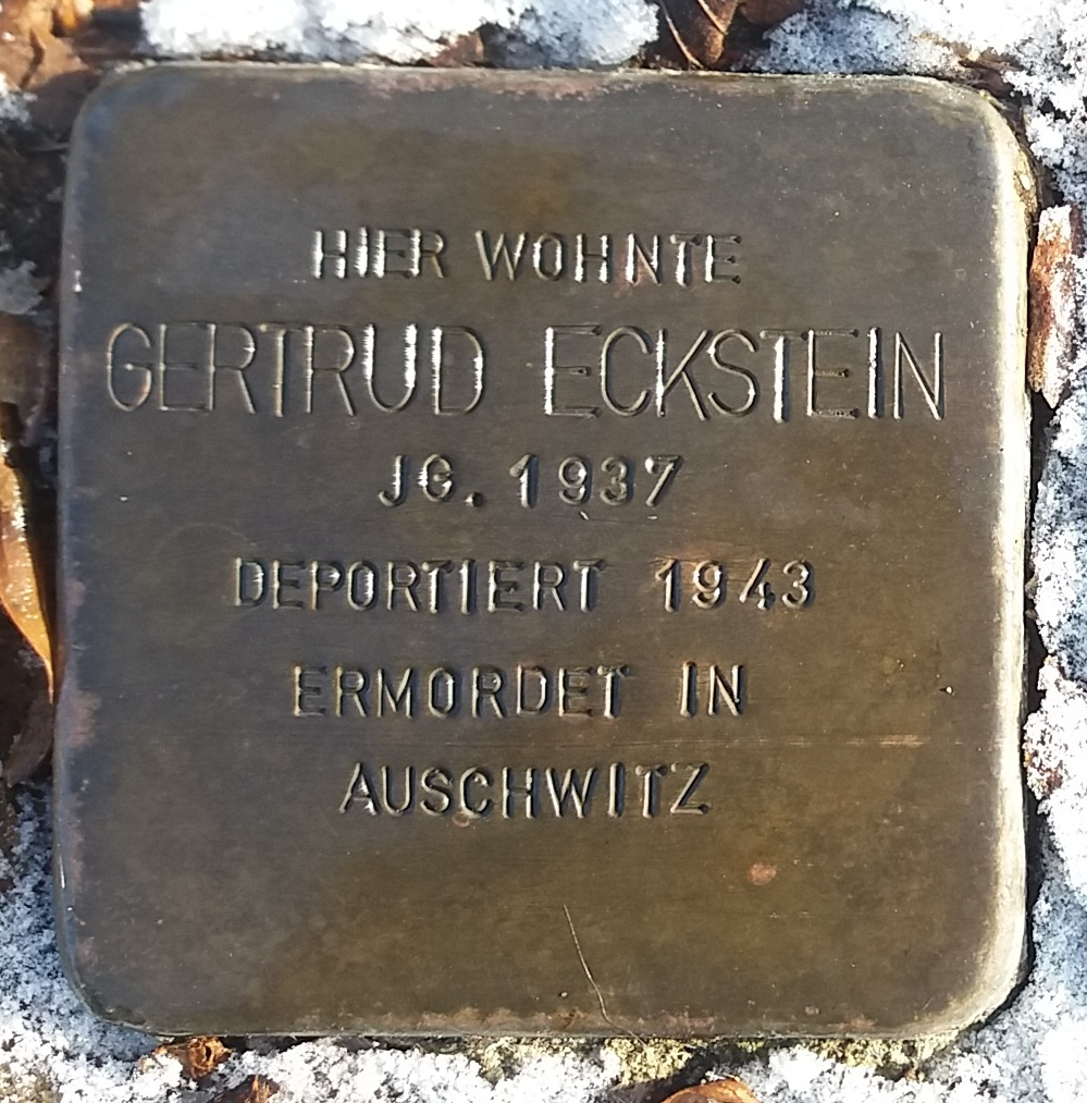 Stolperstein für Gertrud Eckstein, Mitglied der Großfamilie Eckstein, Vöhringen (Iller)